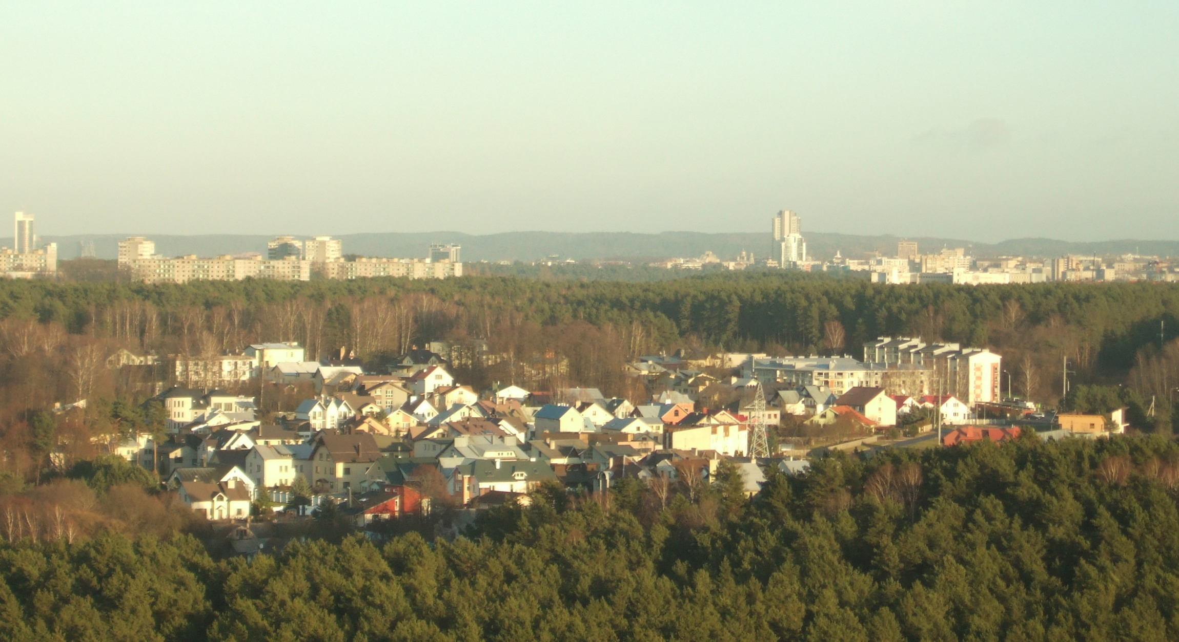 Vilniaus dalis Lazdynėliai (pirmam plane, miške)